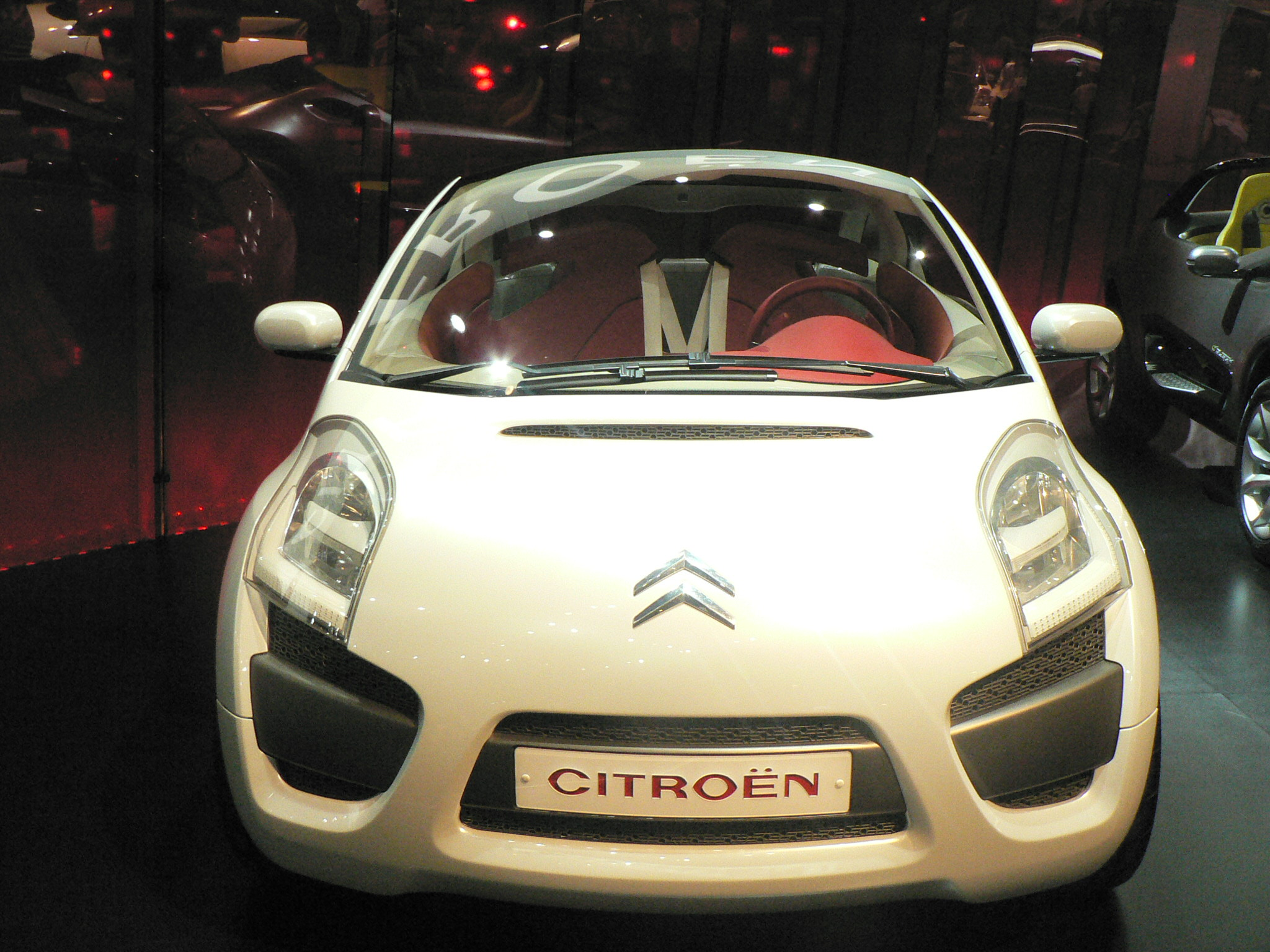 Mondial de l'automobile, Paris 2006